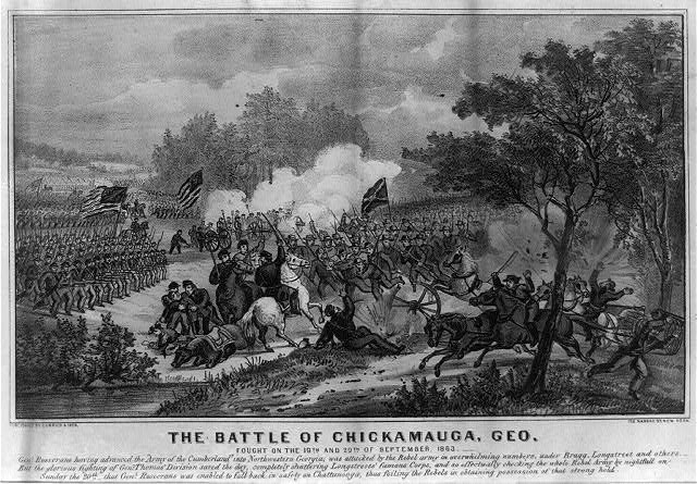 Die Schlacht am Chickamauga Digital ID: cph 3a05385 Reproduction Number: LC-USZ62-1598 (b&w film copy neg.) Repository: Library of Congress Prints and Photographs Division, Washington, DC 20540 USA